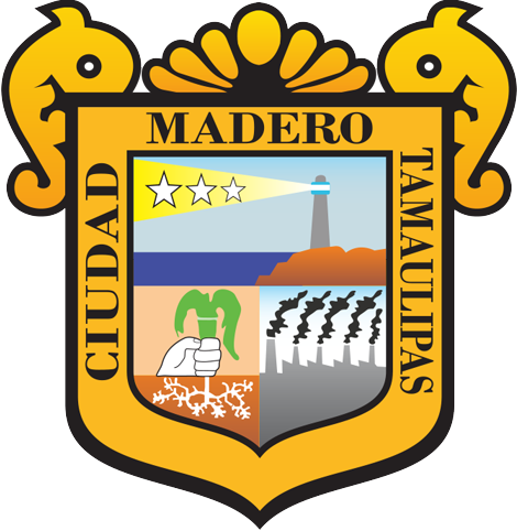 Escudo Ciudad Madero